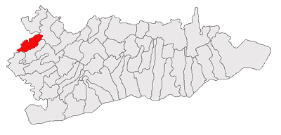 Categorie:Hărţi ale judeţului Călăraşi